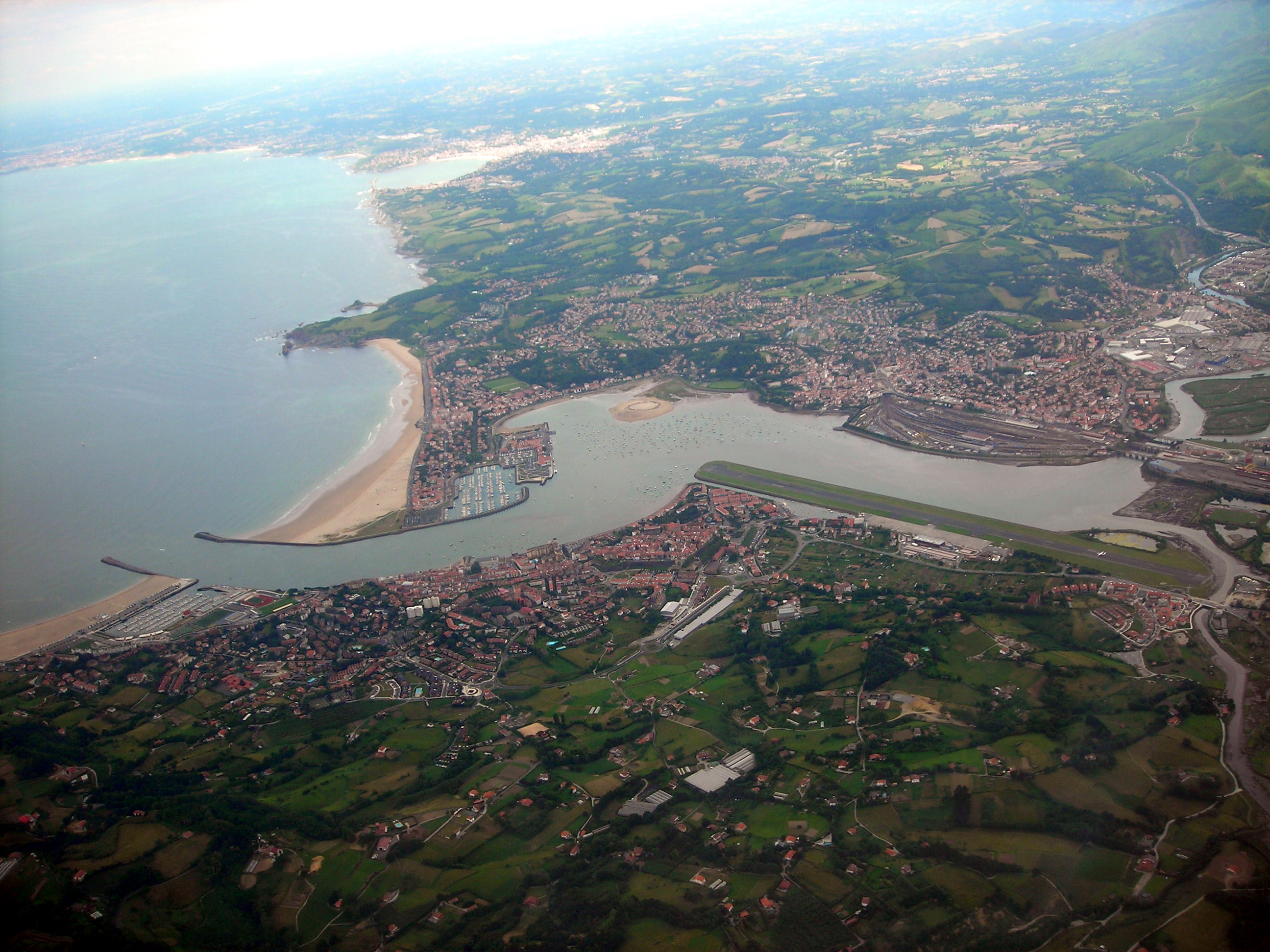 Bidasoa ibaiaren ahoa, Hondarribia eta Hendaia artean.